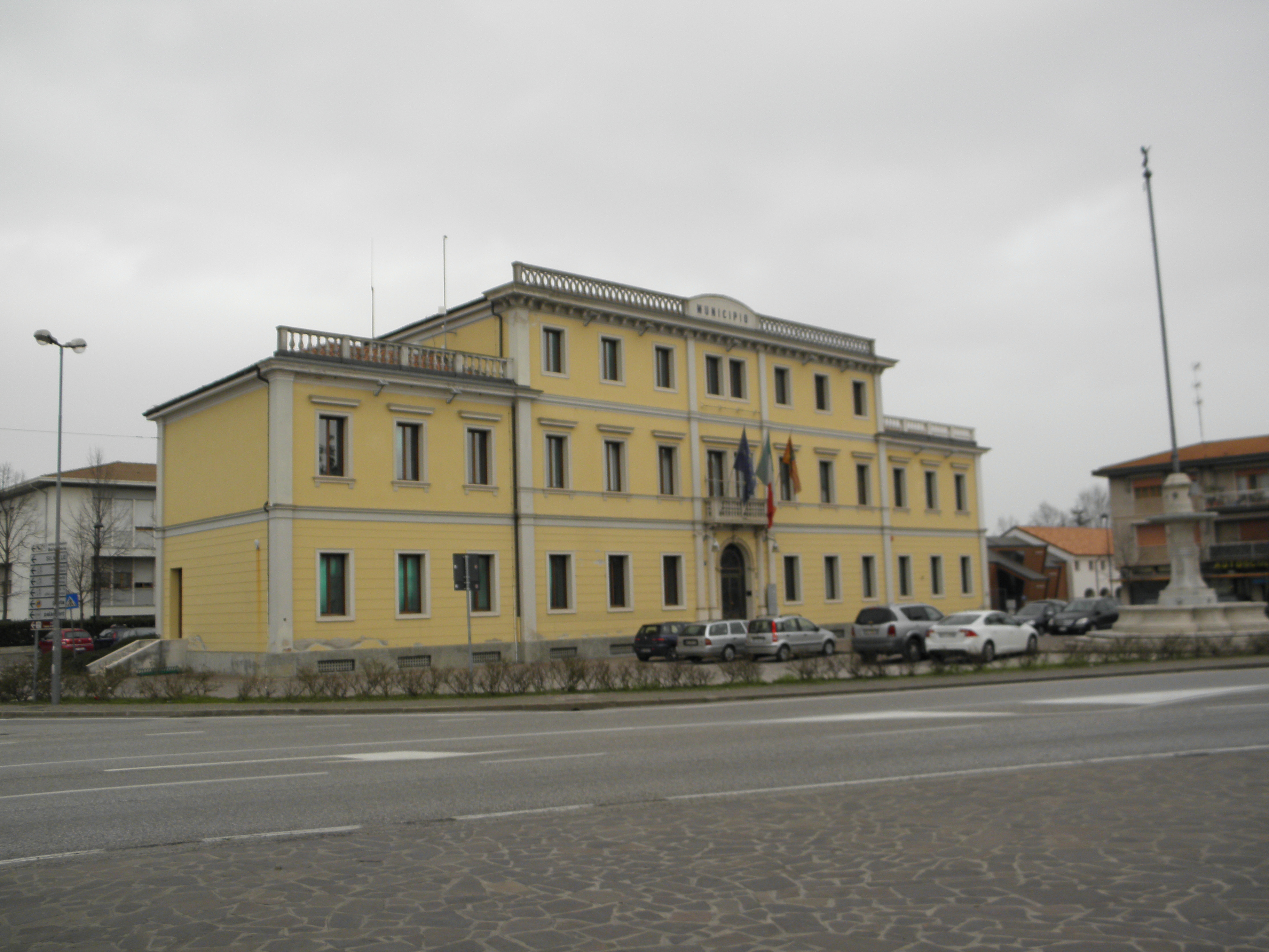 Trebaseleghe: la palazzina sede del comune.